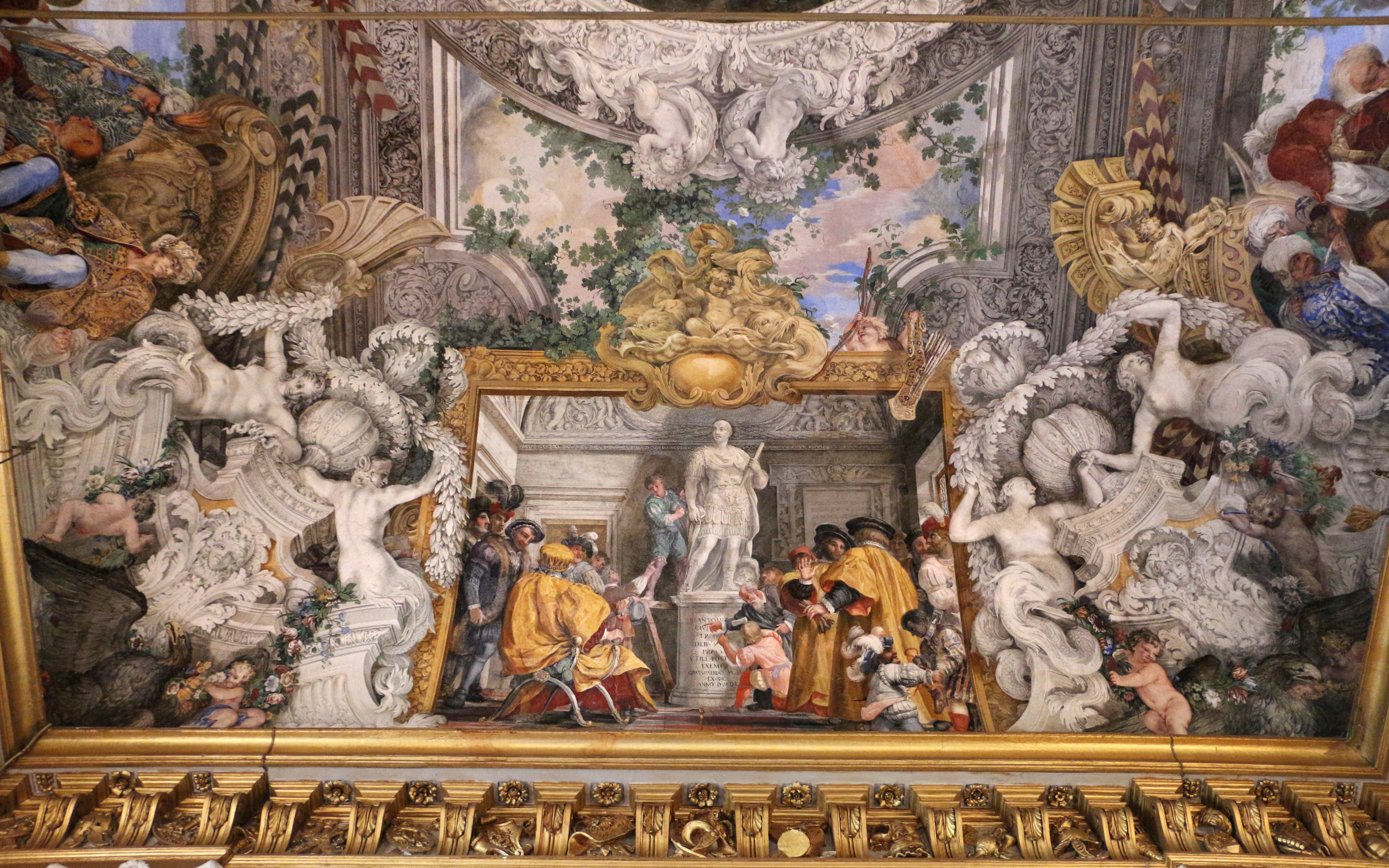 Giovanni Coli e Filippo Gherardi, storie della battaglia di lepanto, 1675-78, 00,1.JPG